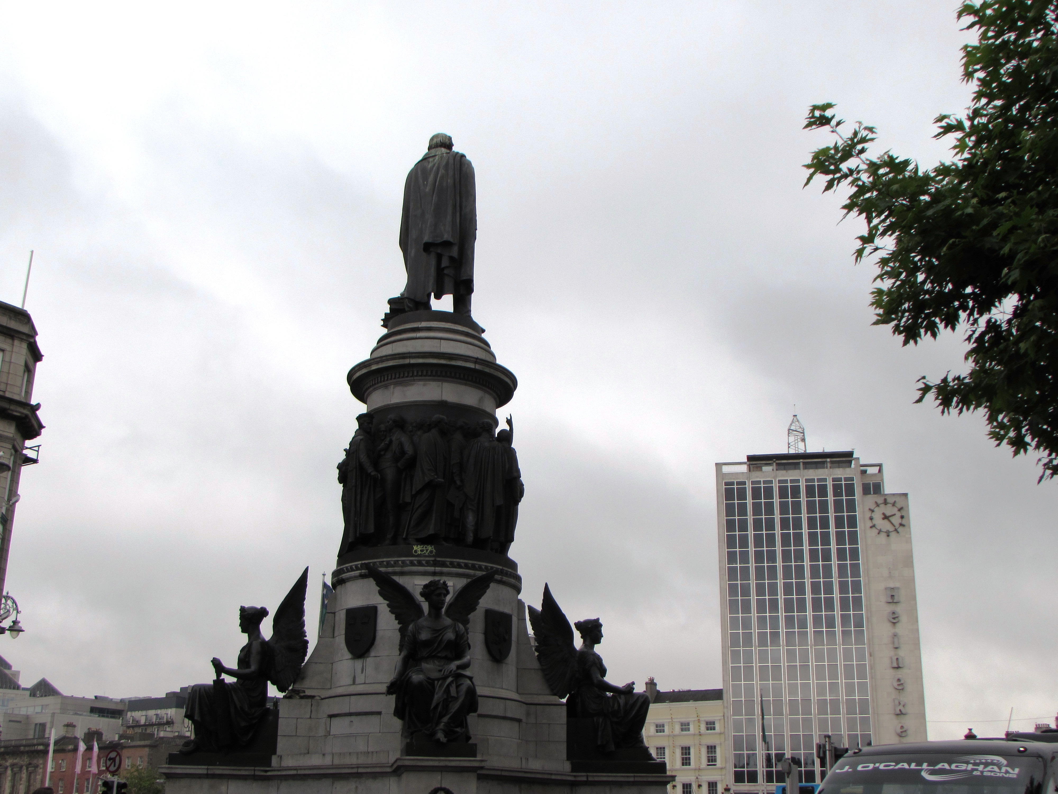 Monumento ad O'Connell, sulla strada omonima